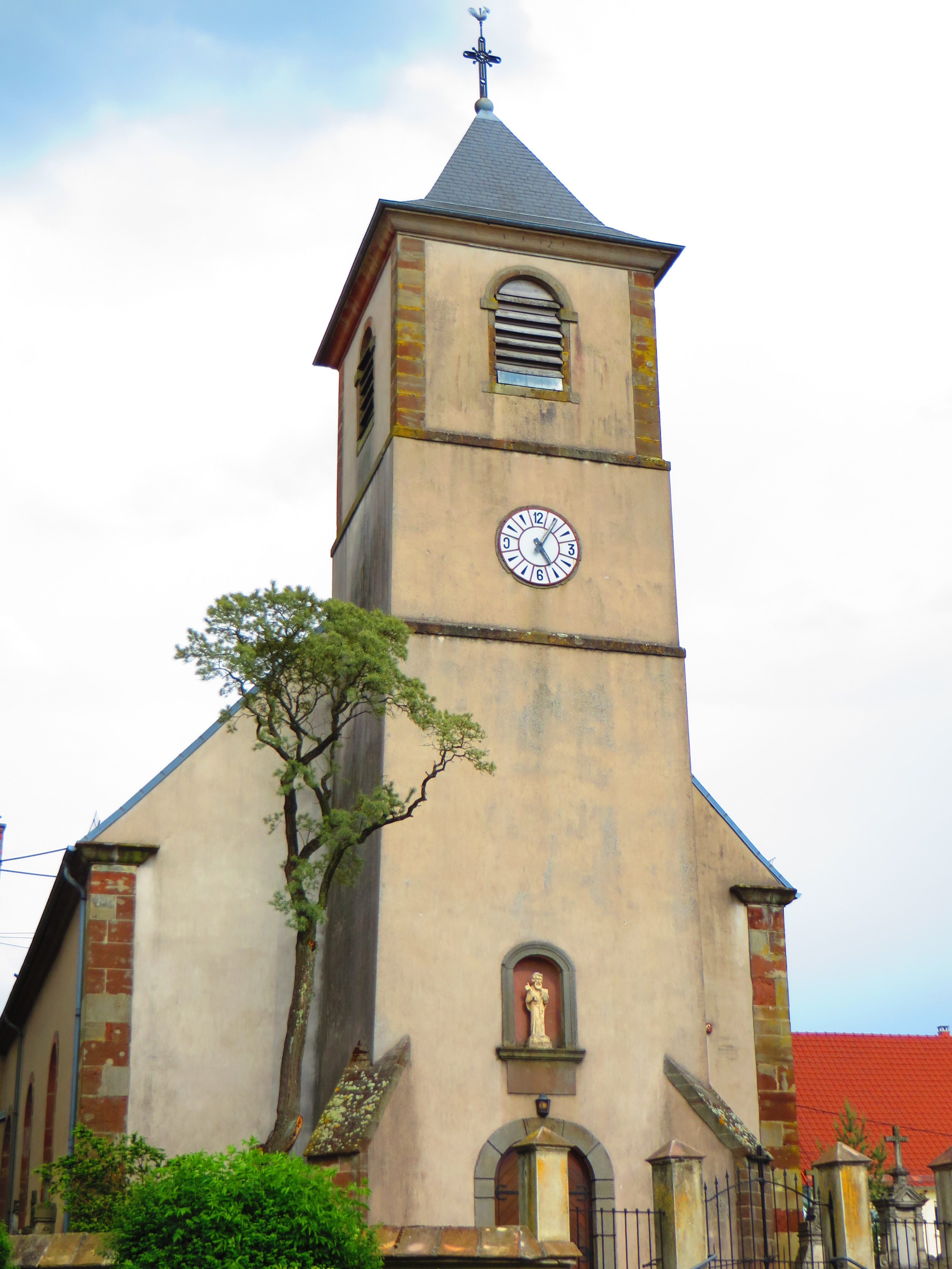 Tenteling Église Saint-Pierre